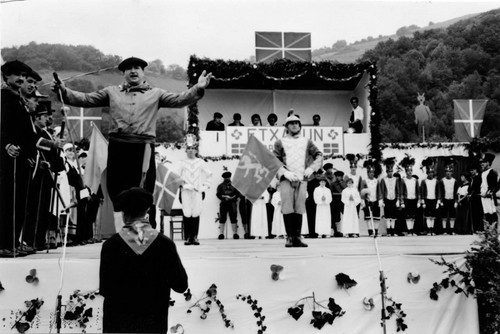 Etxahun koblakari pastorala. 1986. Barkoxe